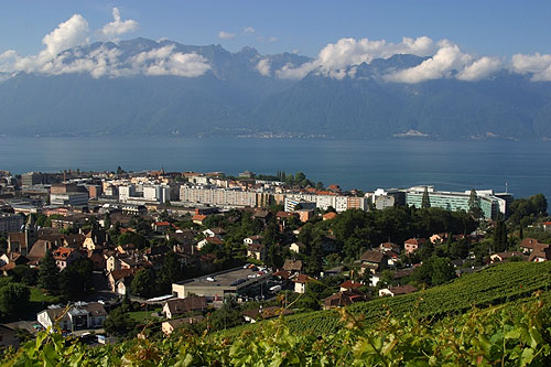 Blick auf Vevey aus Corseaux, den Genfersee und die Savoyer-Alpen